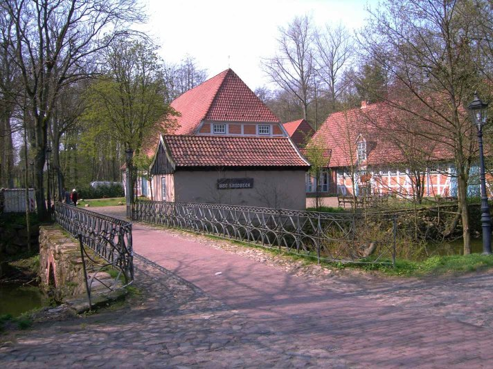 Eingang des Guts Sandbeck in Osterholz-Scharmbeck. Photographiert im April 2005.